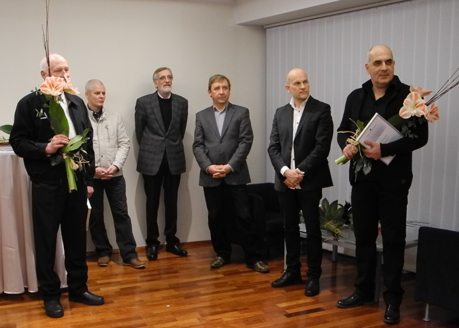 "Mandariinide" tegijad välisministeeriumi kultuuripreemia kätteandmisel. Vasakult: Raivo Trass, Rein Kotov, Lembit Ulfsak, Elmo Nüganen, Ivo Felt ja Zaza Urušadze